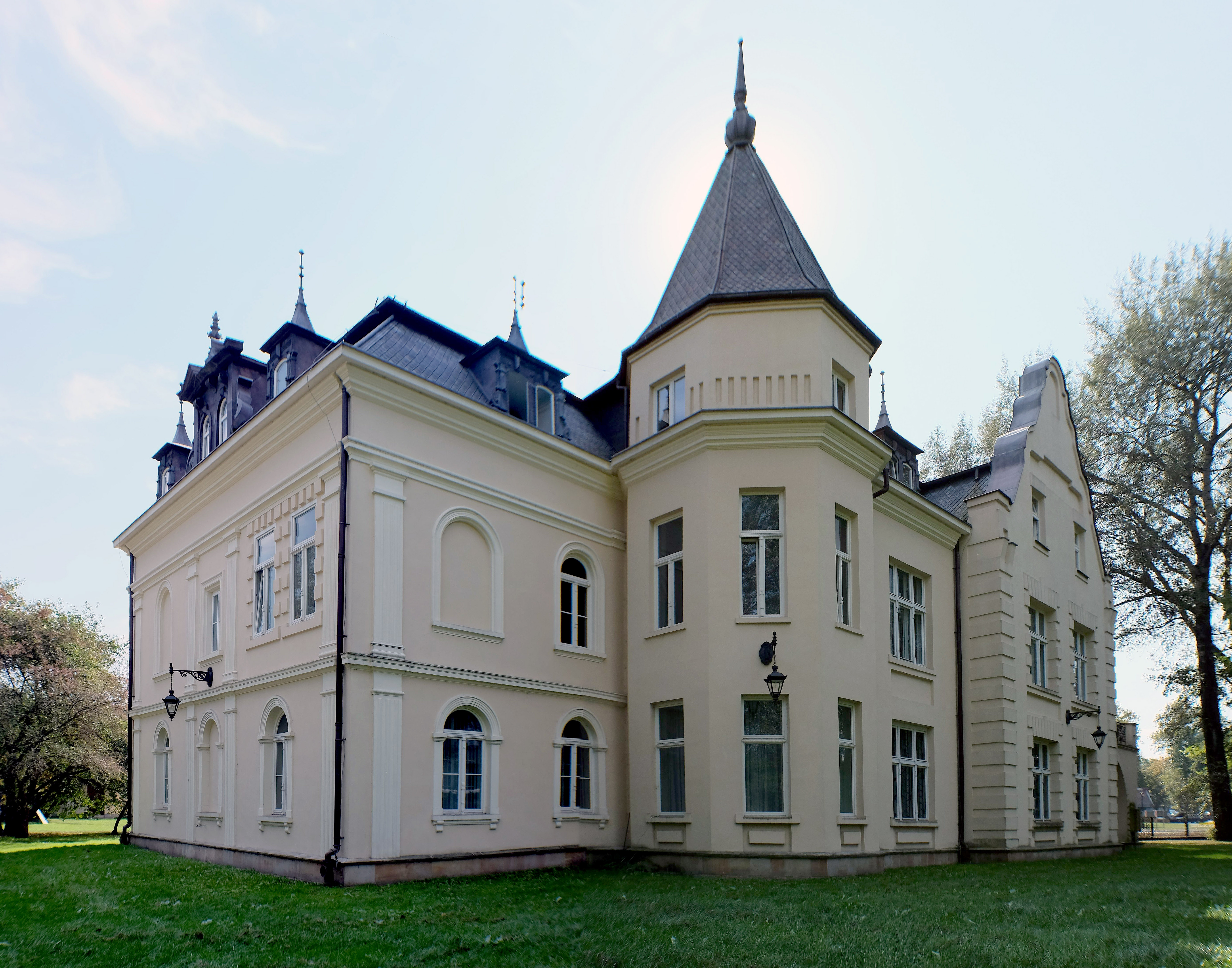 Białystok, zespół pałacowy Hasbacha, XIX/XX